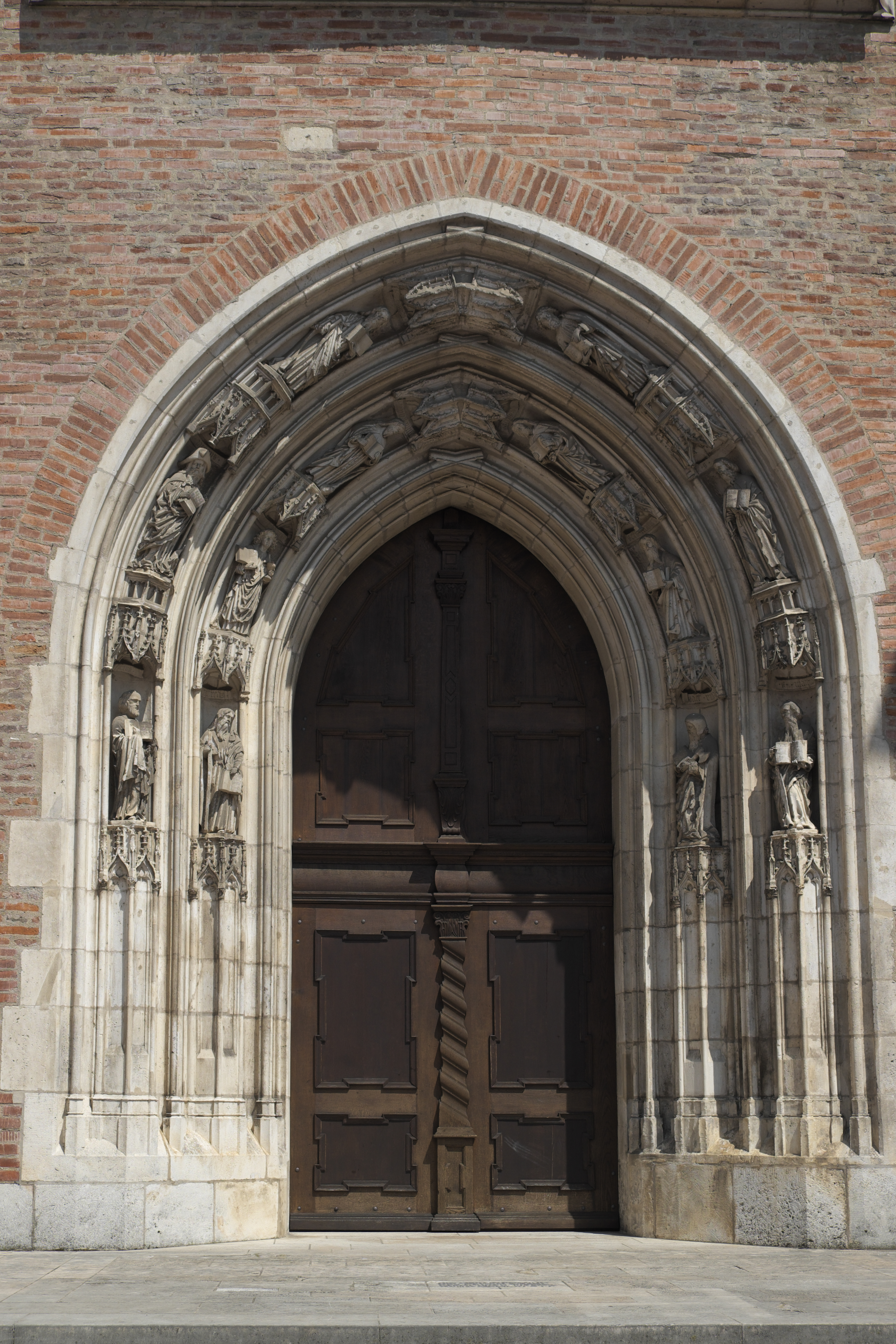 Münster Zur Schönen Unserer Lieben Frau in Ingolstadt (Bayern/Deutschland), Westportal